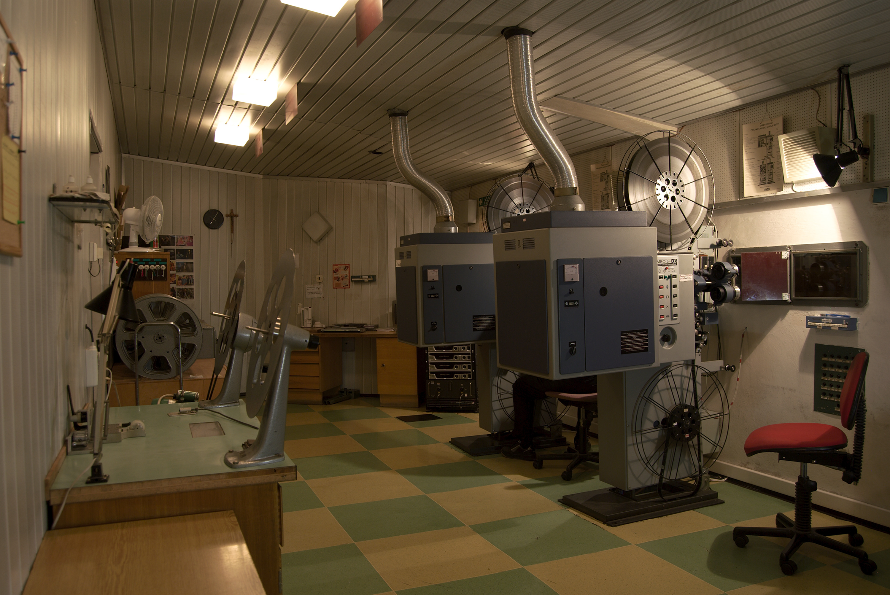 Brněnské kino Scala - promítárna